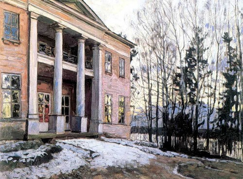 Отблески вечерней зари